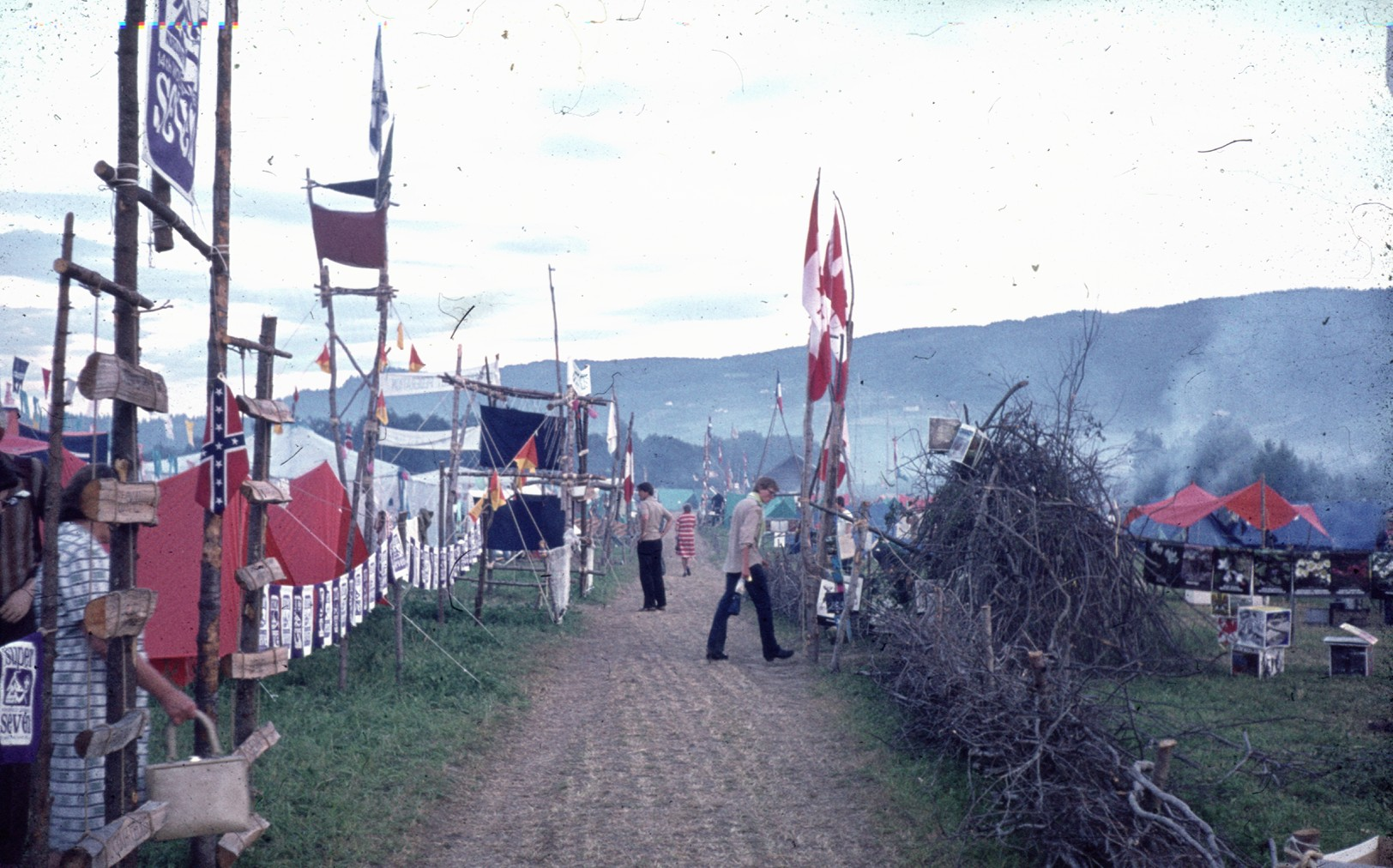 Nordjamb 1975